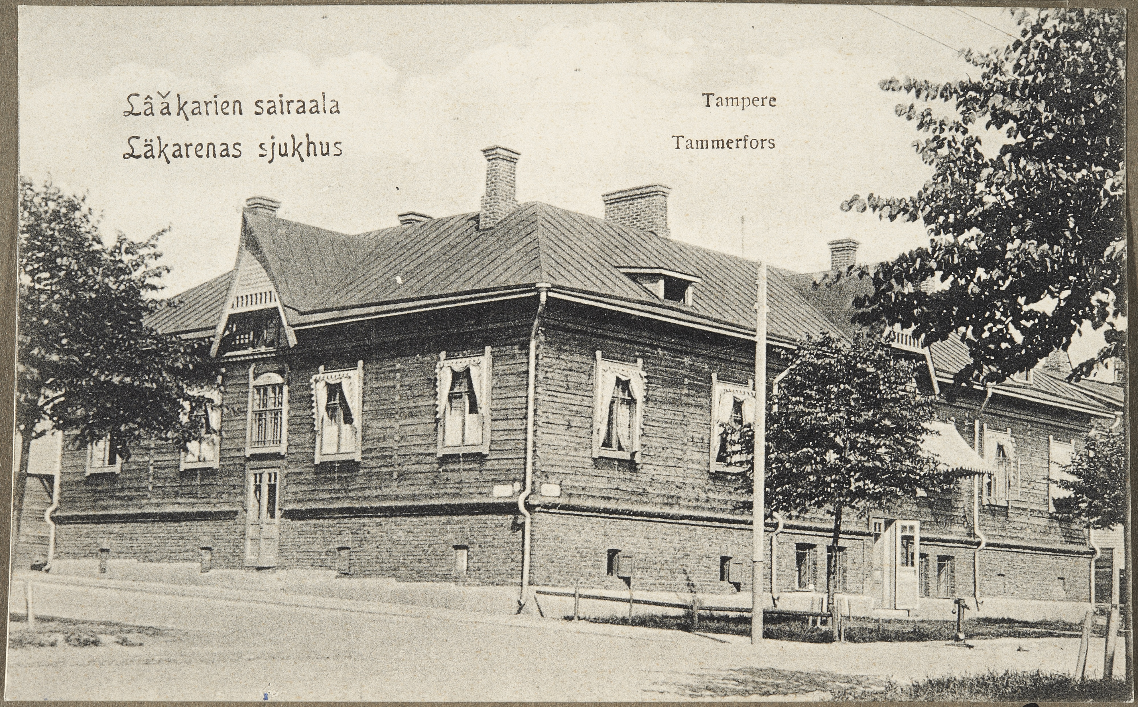 Lääkärien sairaala oli yksityinen sairaala, joka toimi Tampereen Koulukadulla vuosina 1904–1918. Talon suunnitteli Heikki Tiitola. Rakennus on yhä olemassa (Koulukadun päiväkoti), mutta sen ulkoasuun on tehty muutoksia. Kuvan kustantaja: Emil Lyytikäisen Kirjakauppa.